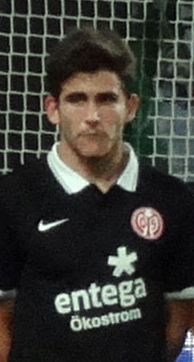 VfL Wolfsburg - Mainz 05 3:0 26.10.2014, Volkswagen Arena Deutsche Bundesliga - Freistoß De Bruyne